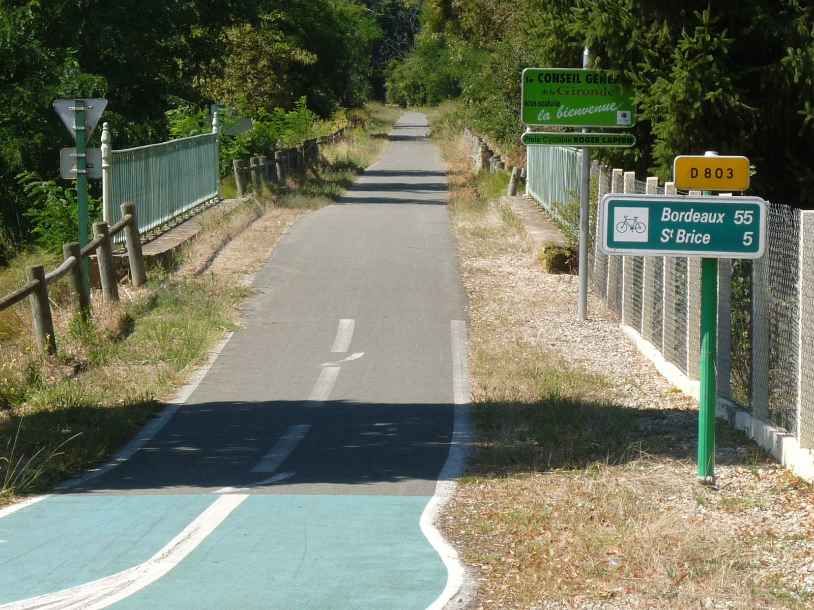 Sauveterre-de-Guyenne, Gironde, France; extrémité de la piste cyclable venant de Bordeaux, ancienne voie ferrée